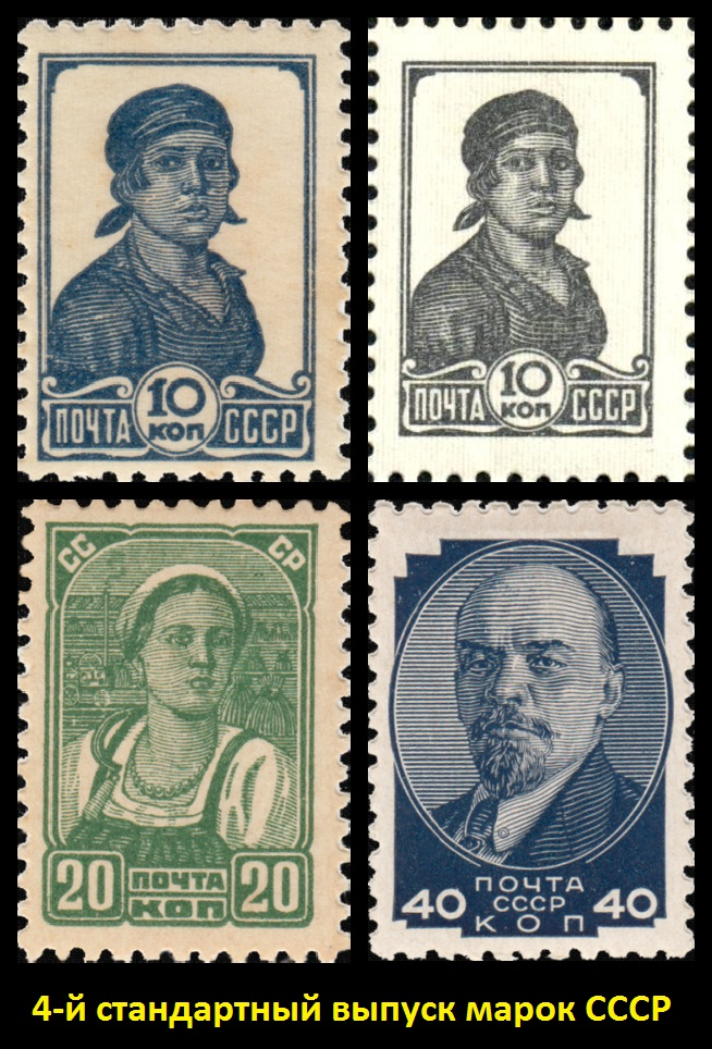 Почто́вые ма́рки четвёртой станда́ртной се́рии СССР (1936—1953) (ЦФА №556—559) поступали в обращение с июня 1936 по декабрь 1953 года.